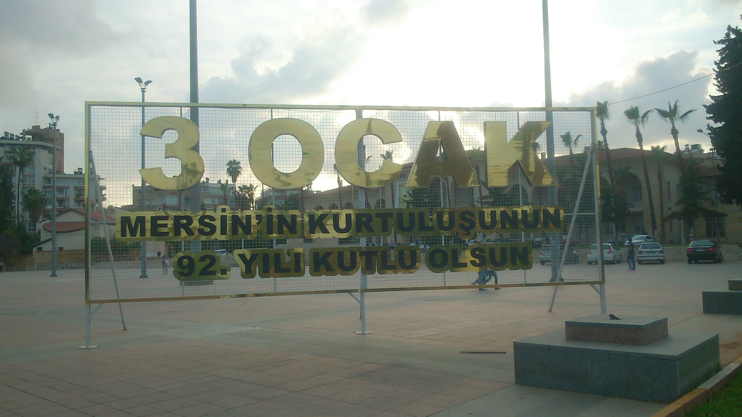 Mersin'in kurtuluşunun 92 yıldönümü için Mersin Kültür Merkezi önüne yerleştirilen pano.